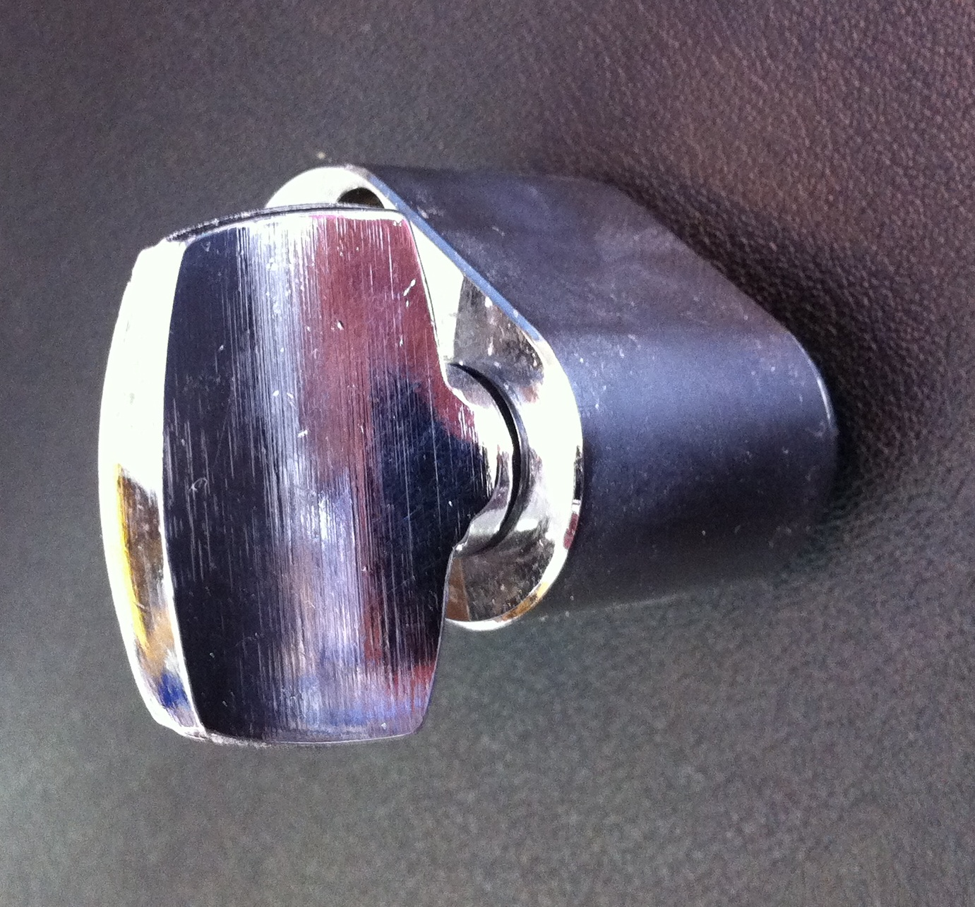 Knappevrider standard oval